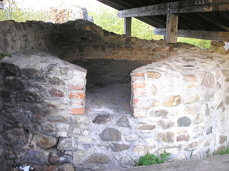 Burg Wolkenberg bei Wildpoldsried (Landkreis Oberallgäu, Bayerisch-Schwaben). Backofen am Hauptgebäude. Eigene Aufnahme, Mai 2008 / Wolkenberg castle near Wildpoldsried (Landkreis Oberallgäu, Bavaria, Germany). Oven at the central building. Own photo, May 2008